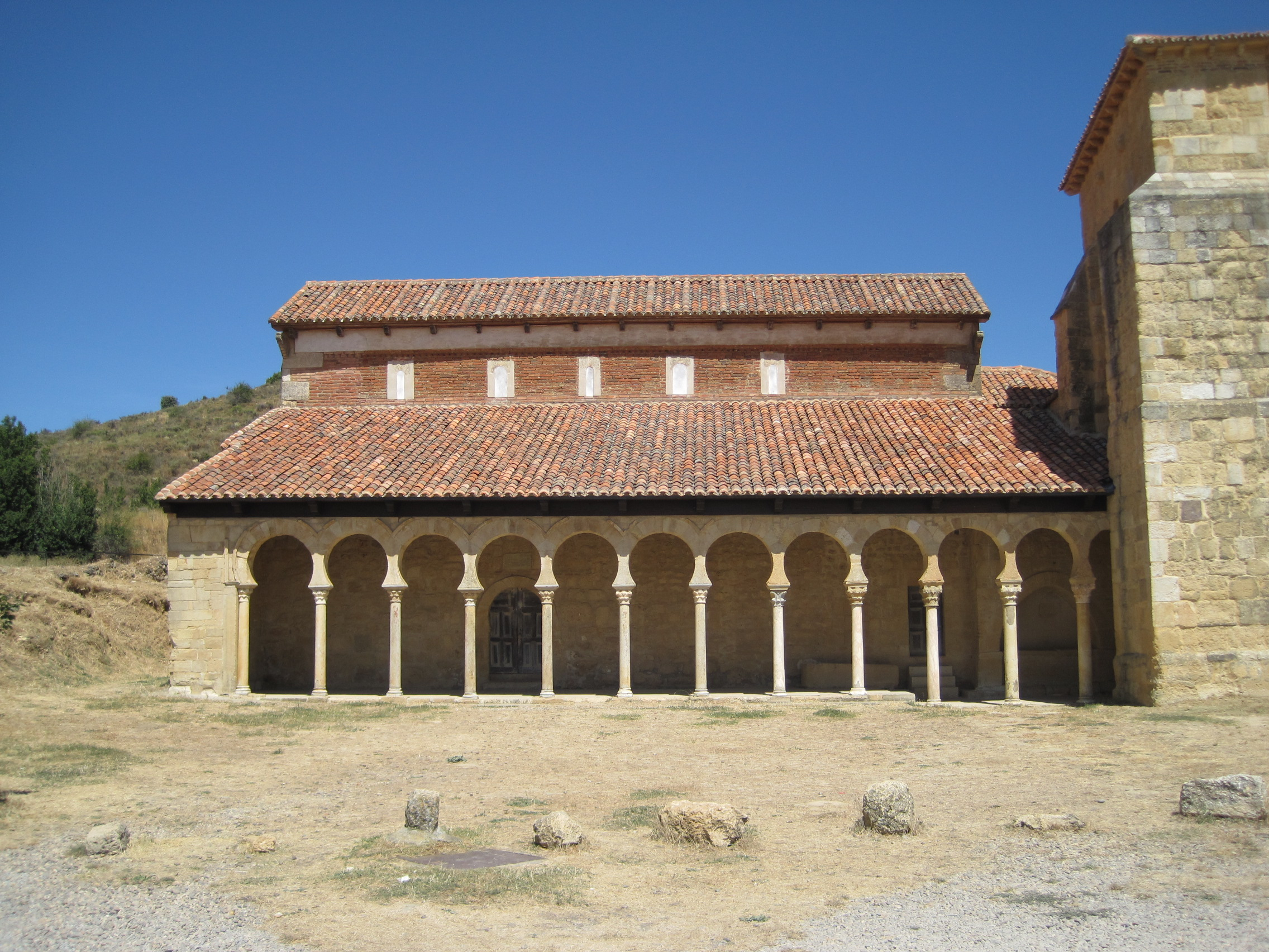 Pórtico del monasterio de San Miguel de Escalada (León, España).